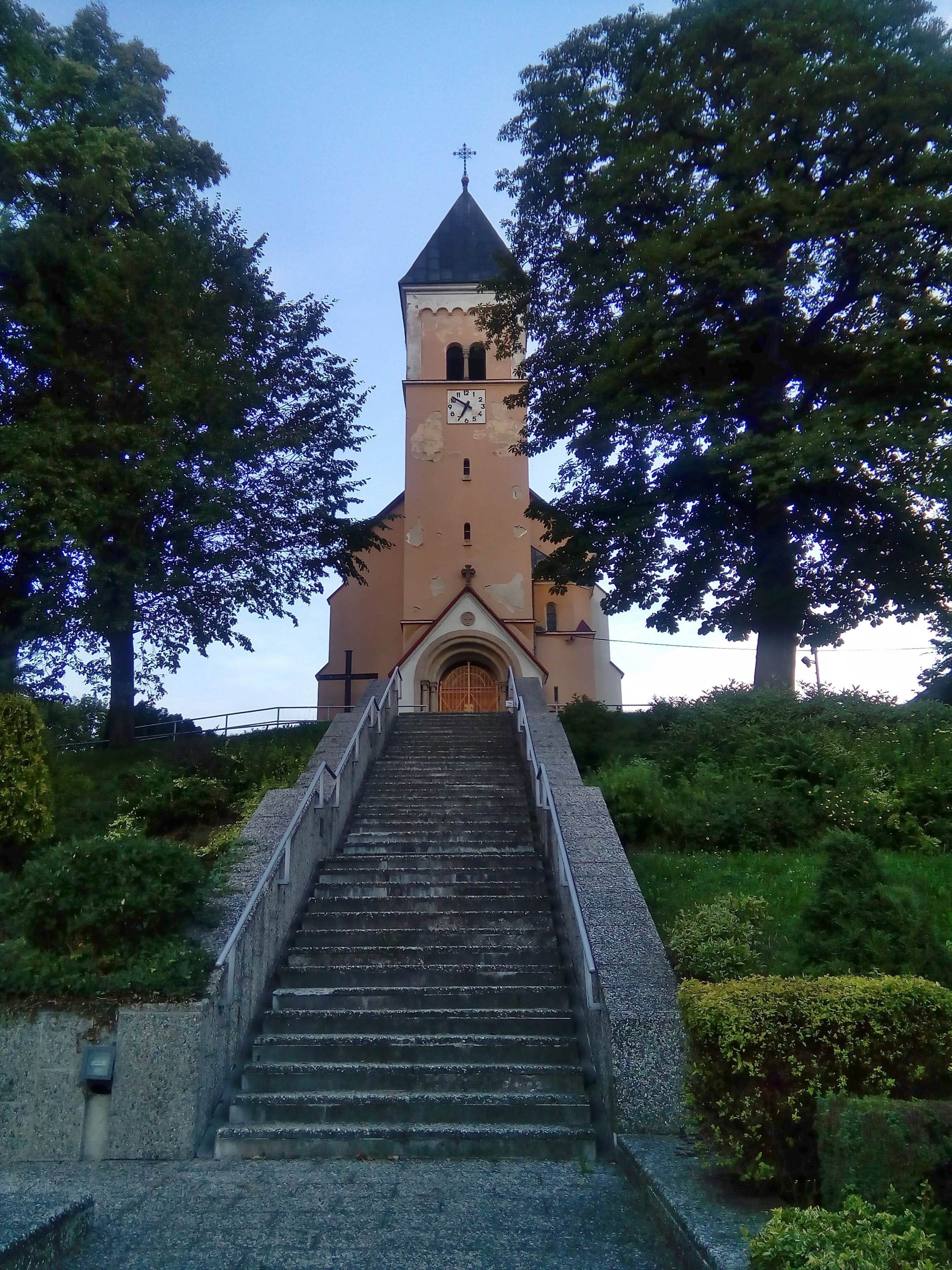 742 72 Životice u Nového Jičína, Czech Republic